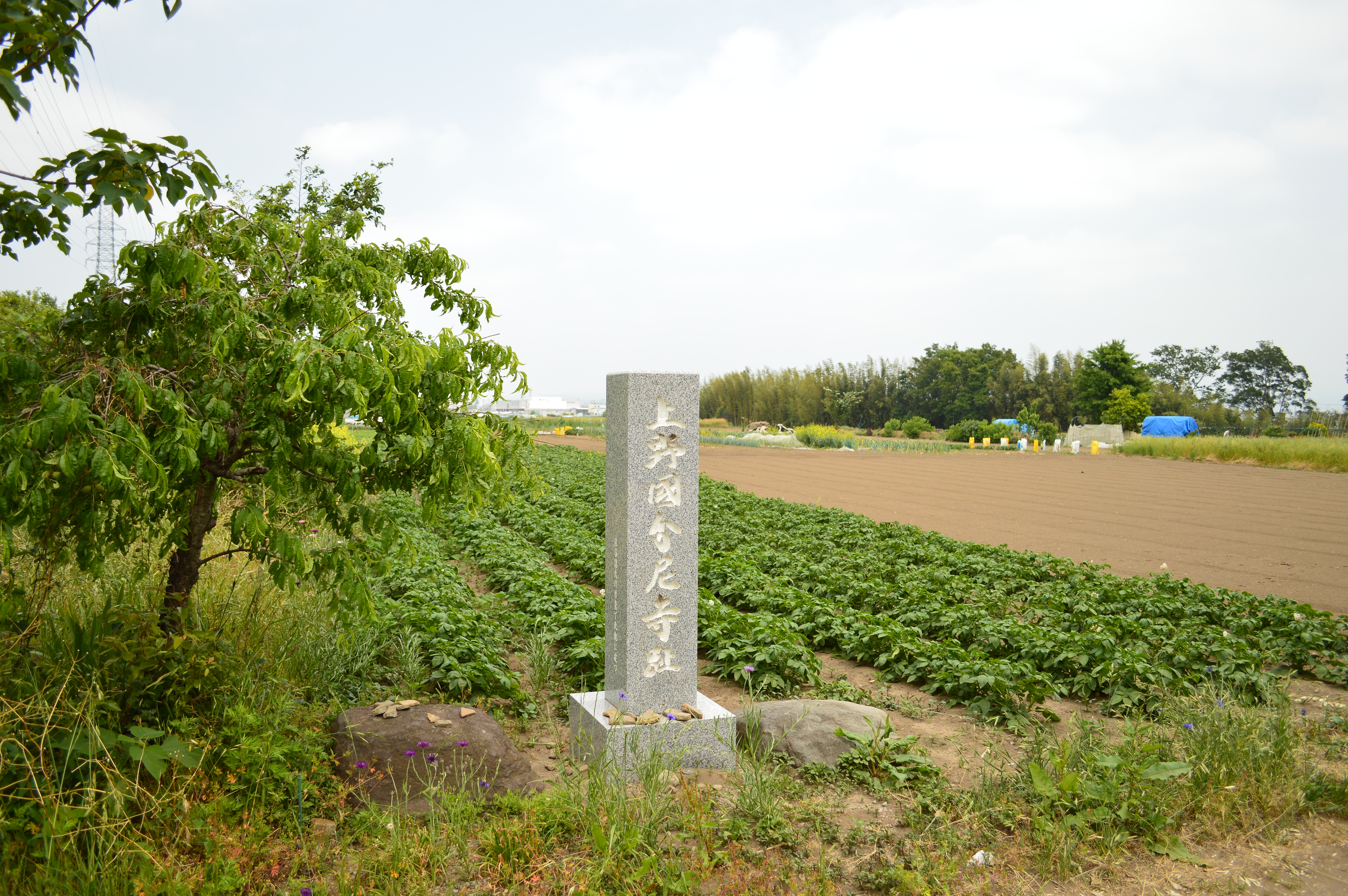 上野国分尼寺跡 石碑